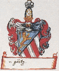 Goriški grb 1688